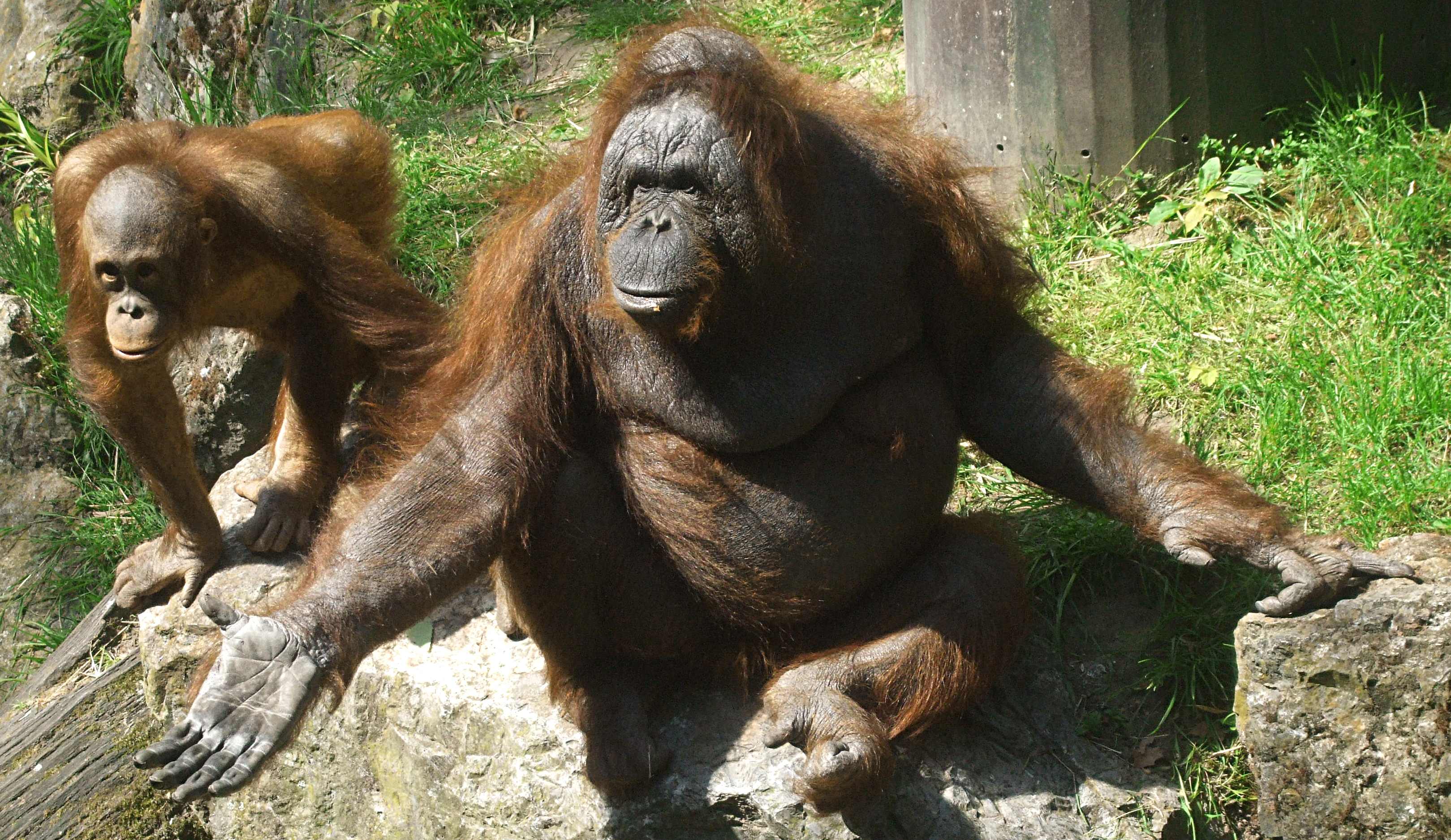 Orang-Utans im Zoo Münster betteln Besucher um Leckereien an.